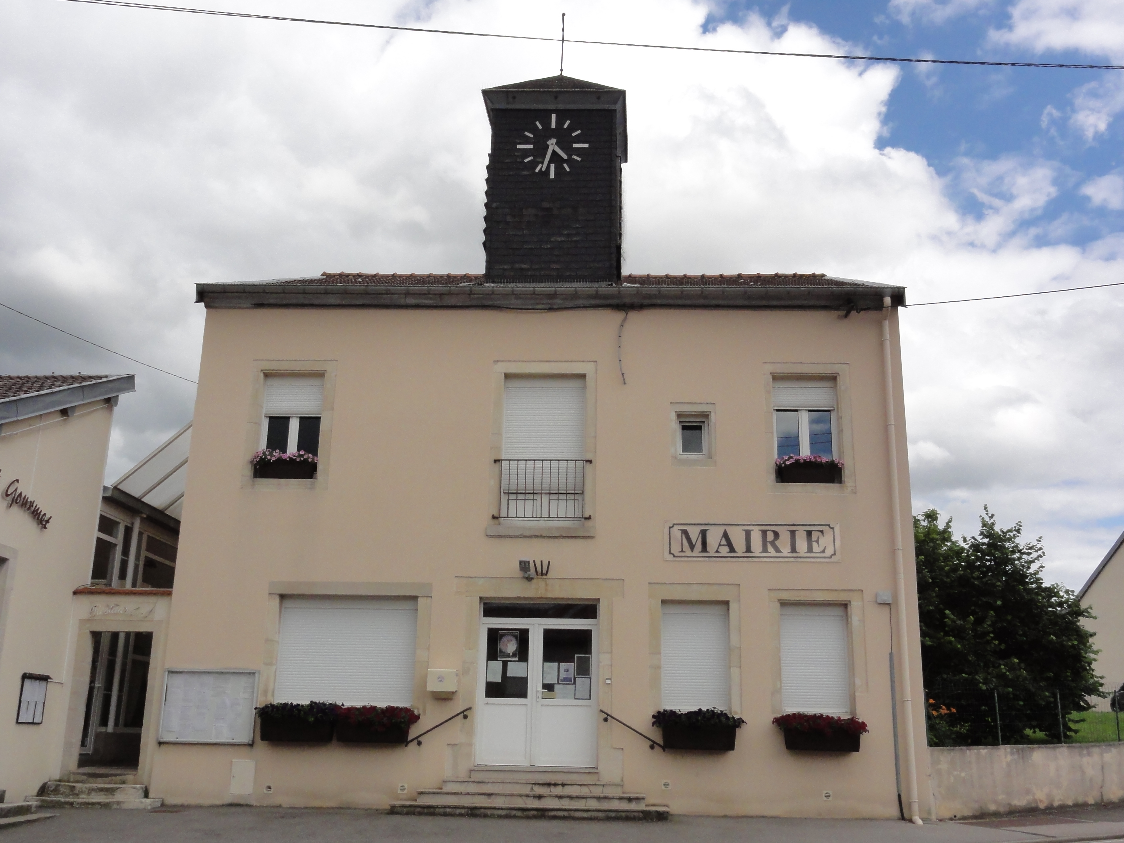 Ville-en-Vermois (M-et-M) mairie